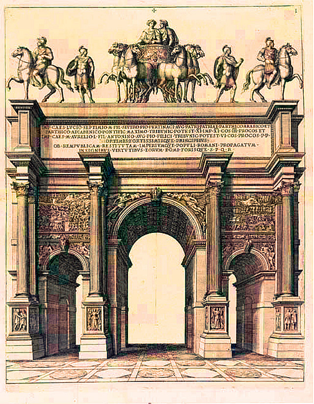 Arc de Septime Sévère à Rome relevé fait en 1676 par Joseph Marie Suares en 1676 pour le cardinal Barberini